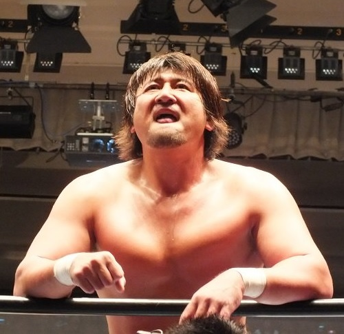 2012.11.17 全日本プロレス後楽園ホールにて。